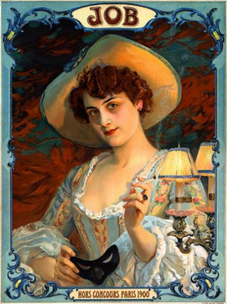 Calendrier de la Collection JOB illustré par Paul Jean Gervais 1904